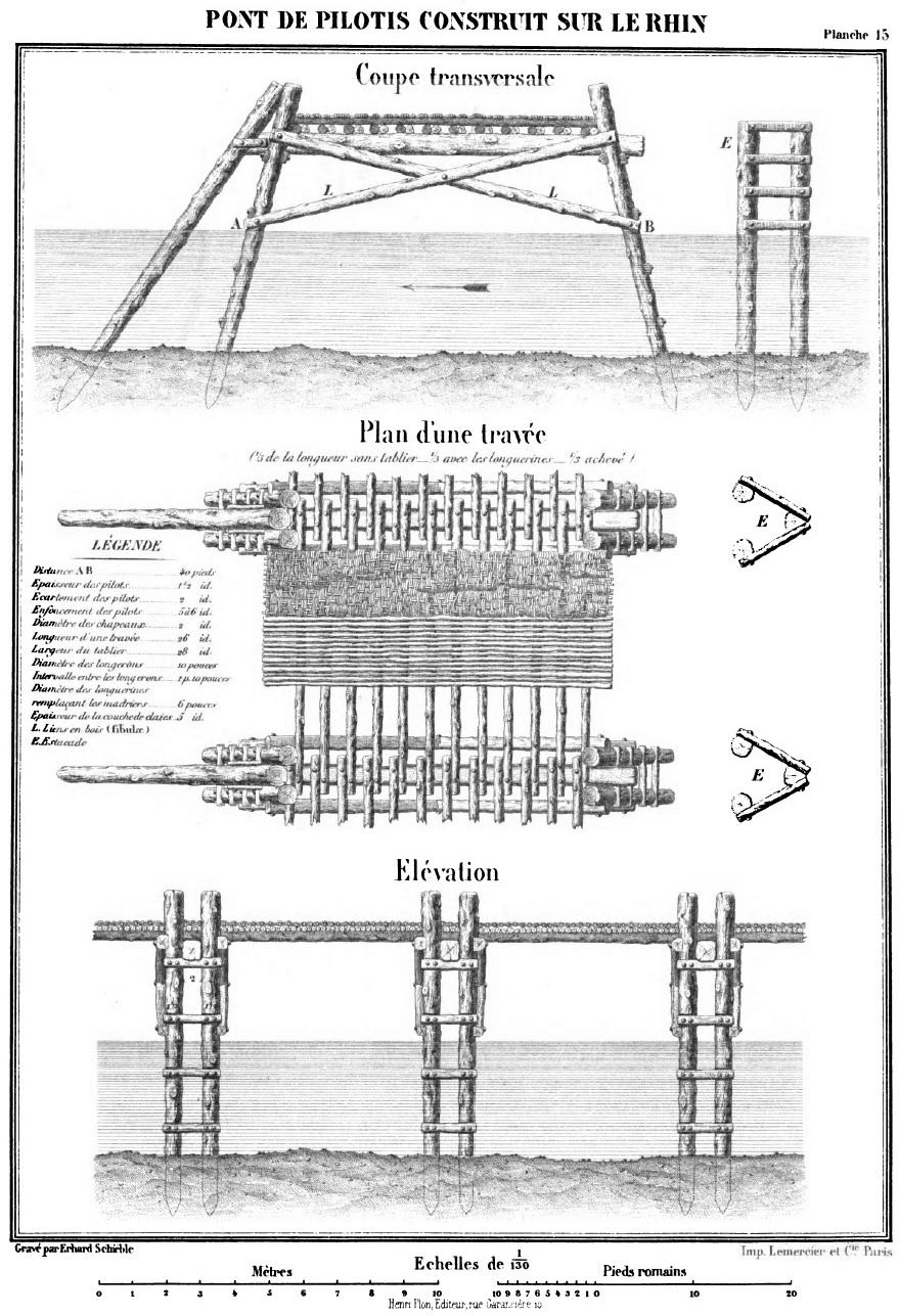 Louis Napoleon Bonaparte - Histoire de Cesar - Atlas 2 - Planche 15